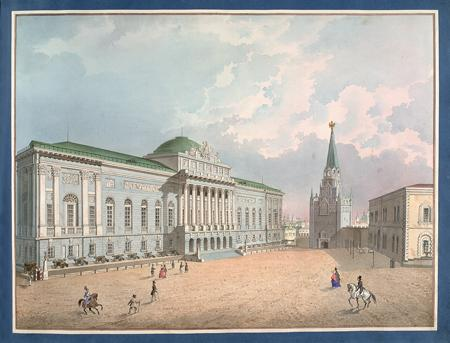 Вид на старое здание Оружейной палаты